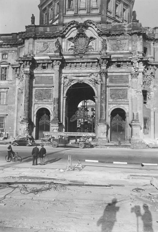 Illus-Igel-Kemlein-2.1.51-Kno-Bl. Abriss der Berliner Schlossruine. Das Eosanderportal der Schlossruine vor dem Abriss.